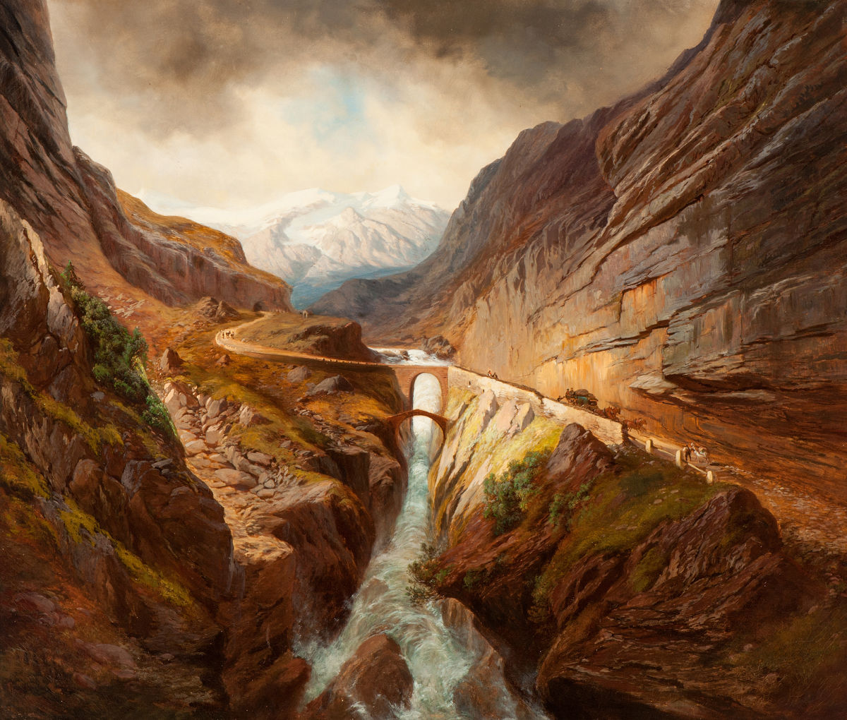 Die Teufelsbrücke am St. Gotthard. Öl auf Leinwand, unsigniert. 80,1 x 93,5 cm